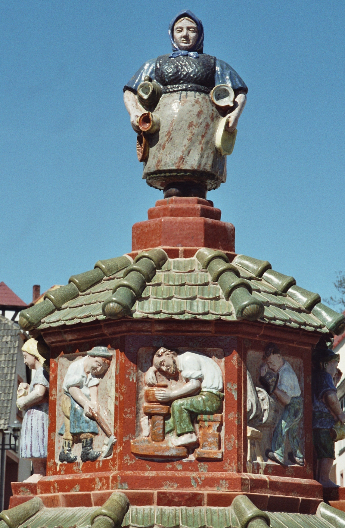 Detail am Töpferbrunnen in Kohren-Sahlis